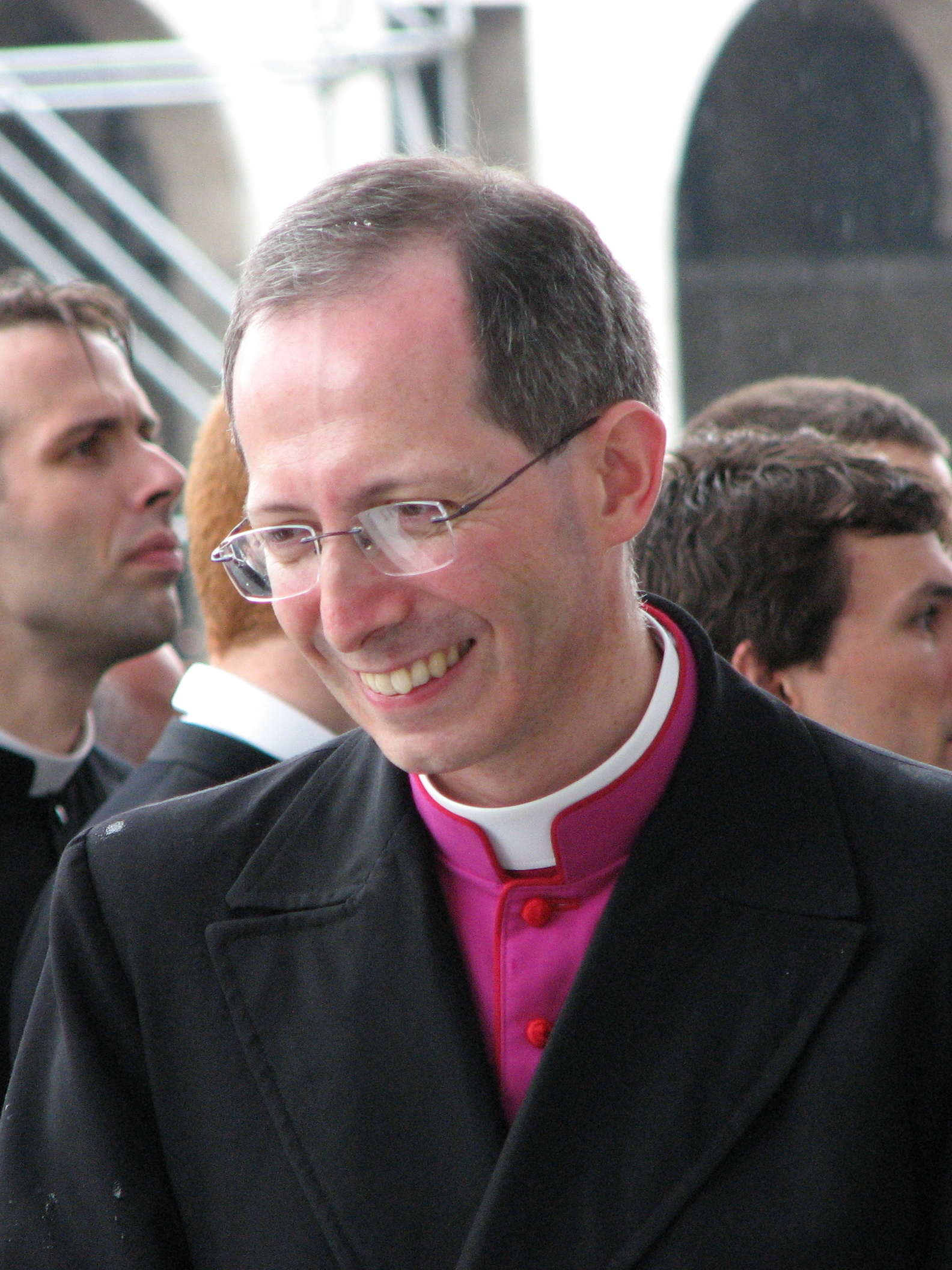 Mons. Guido Marini, cerimoniere del Santo Padre Benedetto XVI, prima della Santa Messa di chiusura della visita del Papa a Genova, Piazza della Vittoria (18 maggio 2008)